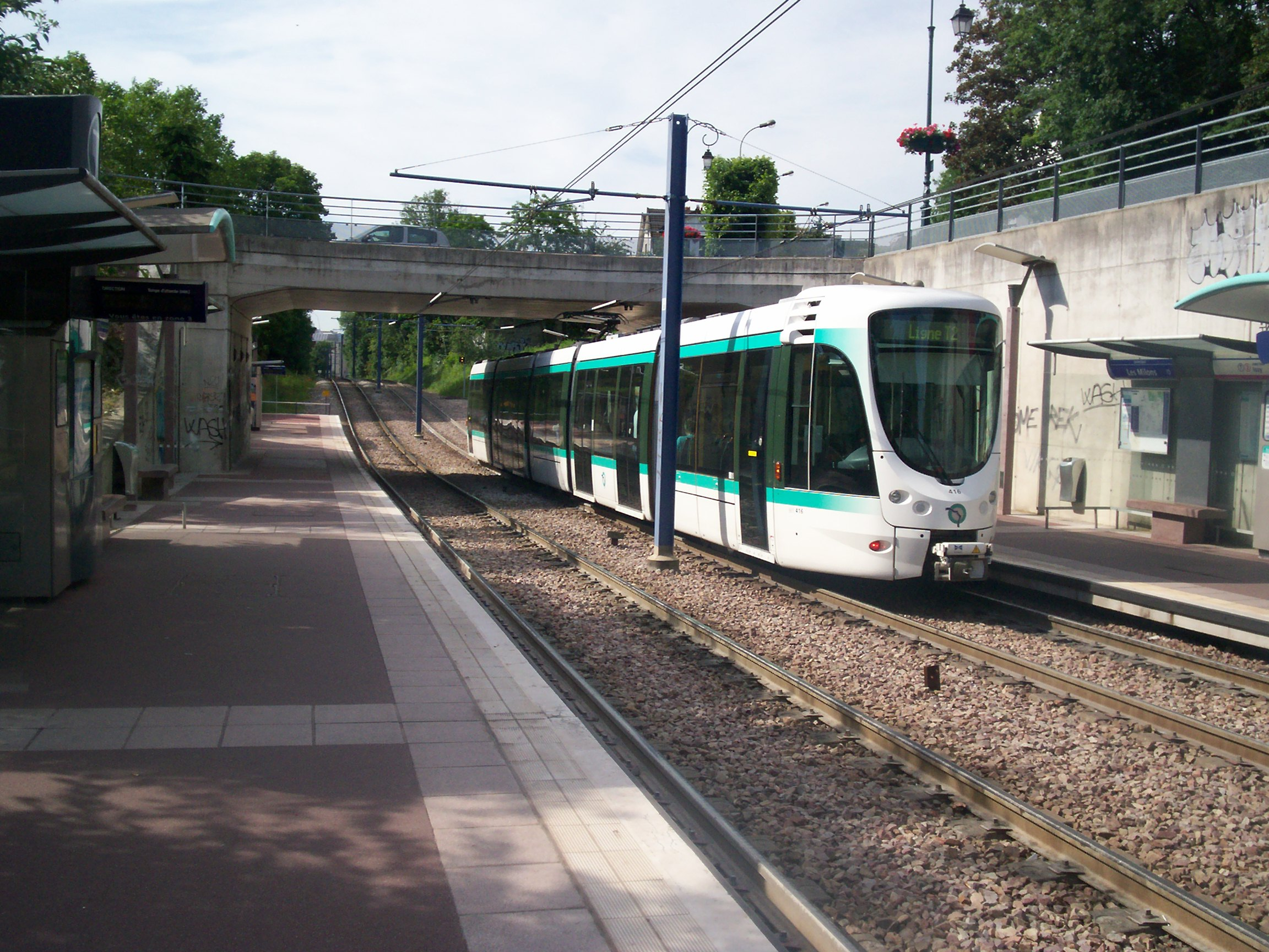 Paris Tramway ligne 2